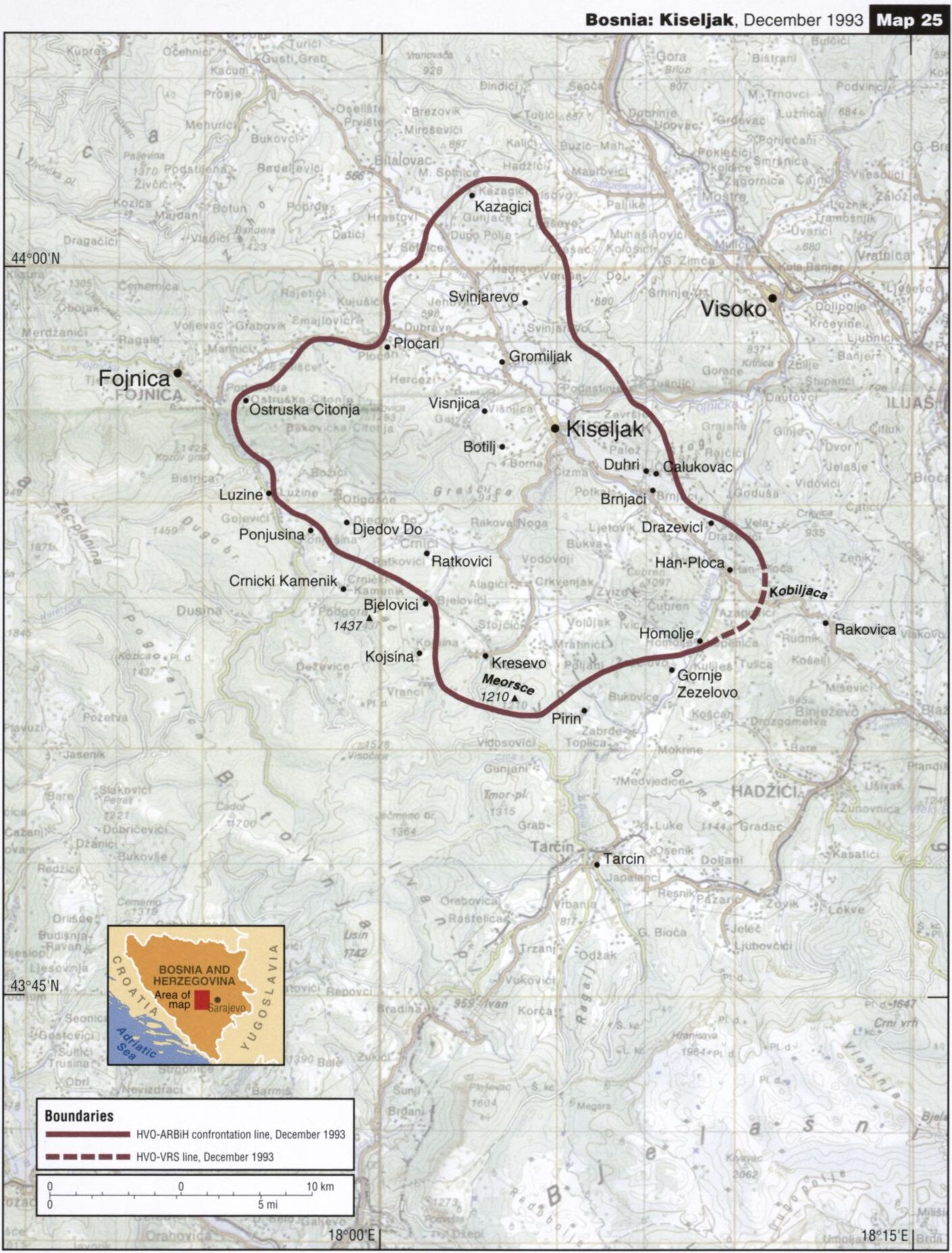 Crte bojišnice između HVO-a i ARBiH te VRS-a, prosinac 1993.